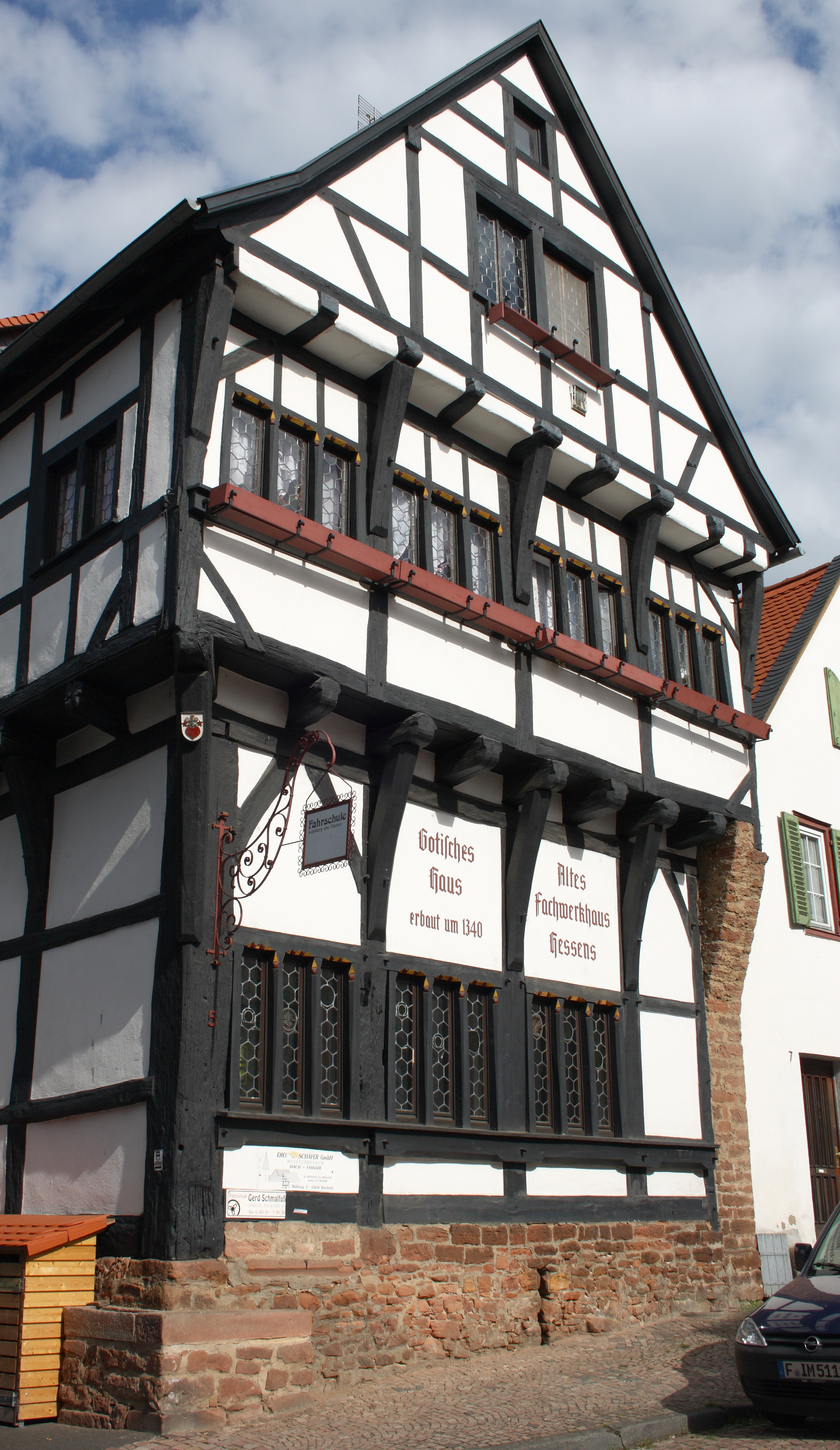 Gotisches Haus in Gelnhausen im Main-Kinzig-kreis (Hessen), Kuhgasse 5